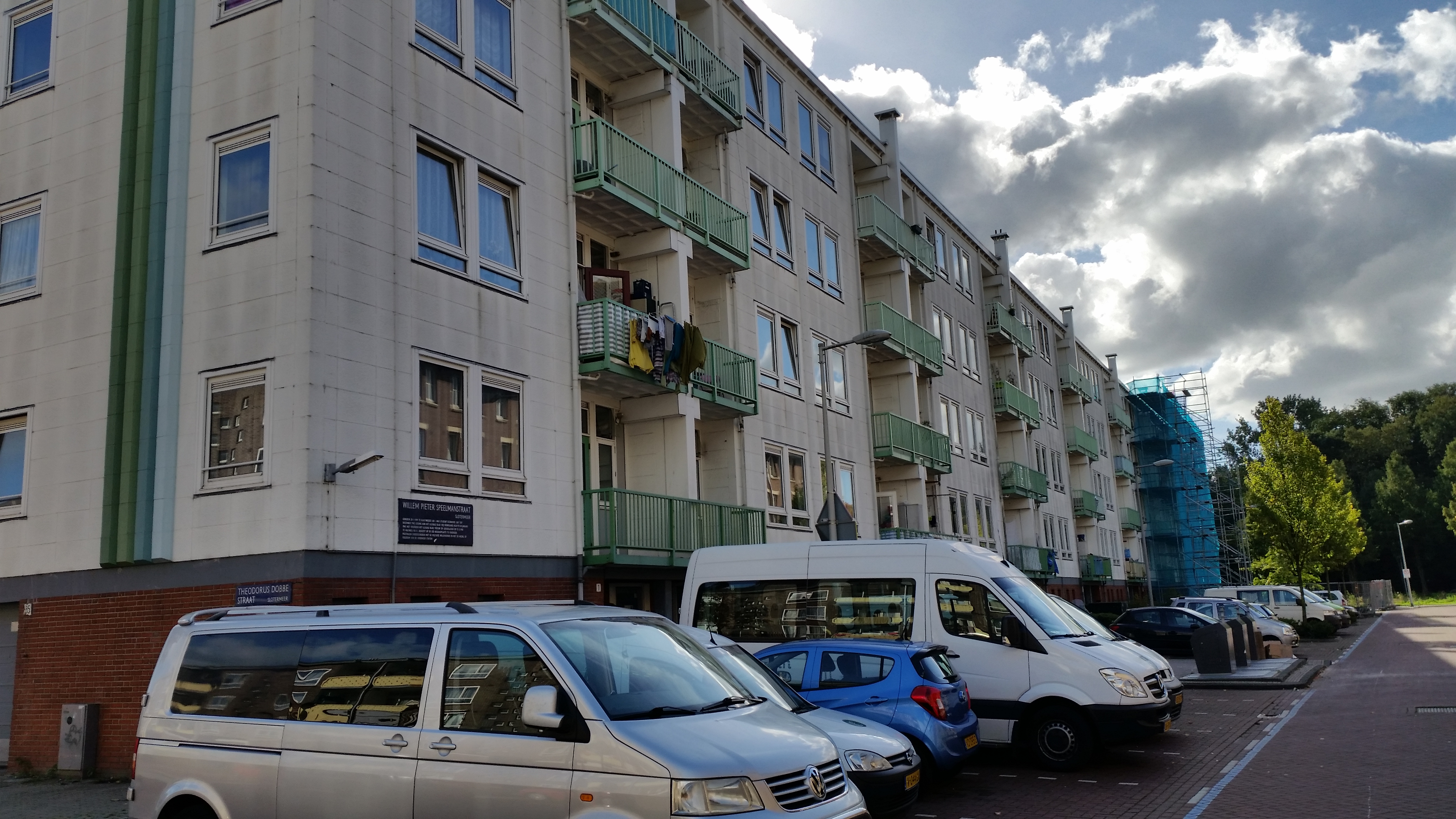 Speelmanstraat, Amsterdam, portieken aan oneven zijde; architect Berghoef